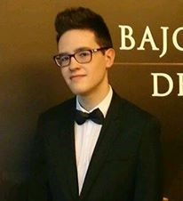 El actor Álvaro Palomo en la premiere del film Bajo un manto de estrellas. Fotografía con licencia libre.